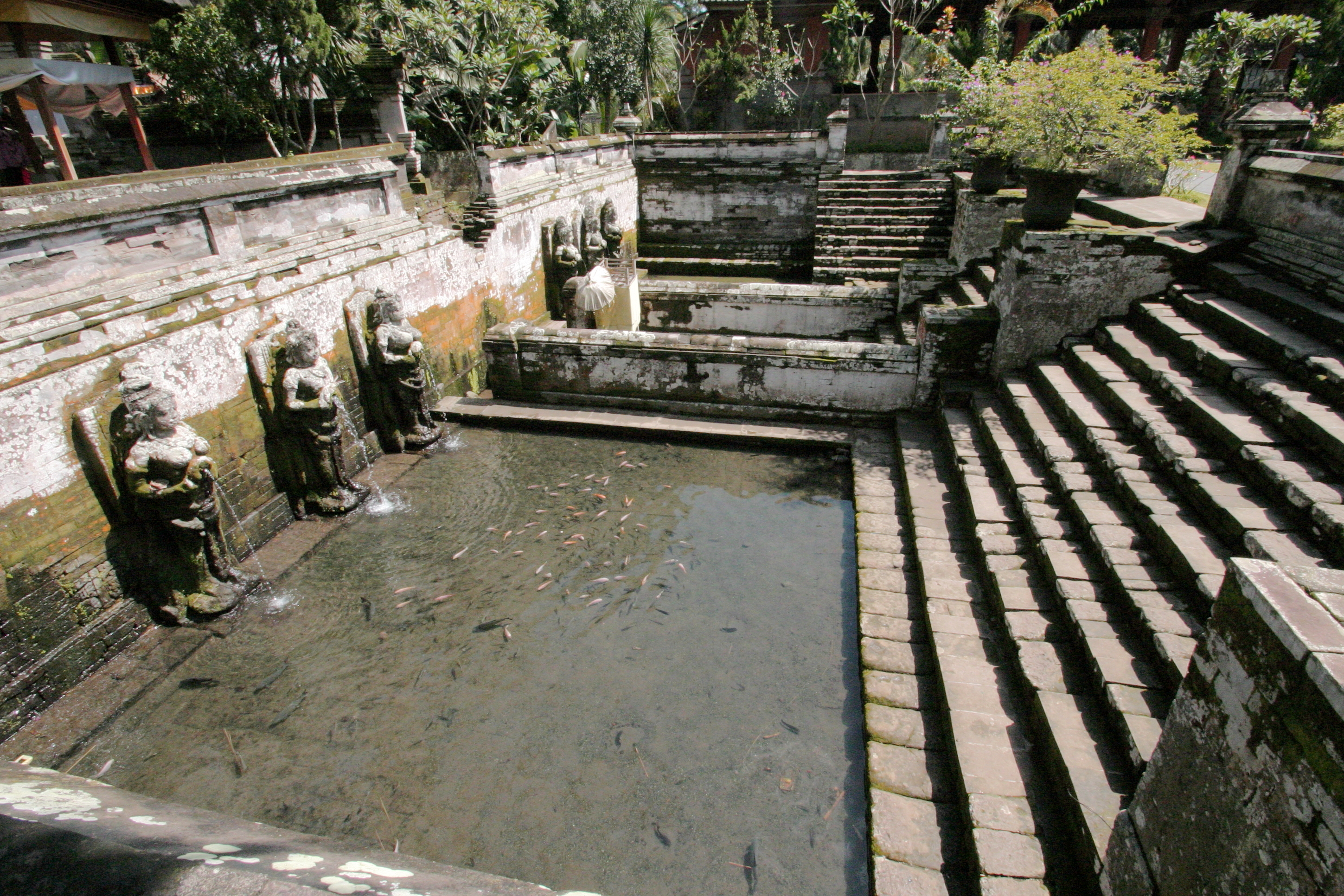 胸元に水差し（噴水）を備えた6体の女像（アプサラス）がある